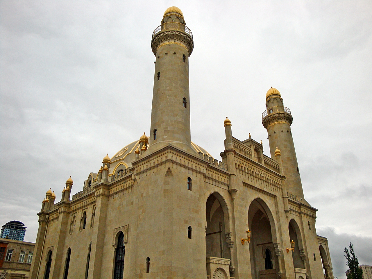 Təzə Pir Məsçidi